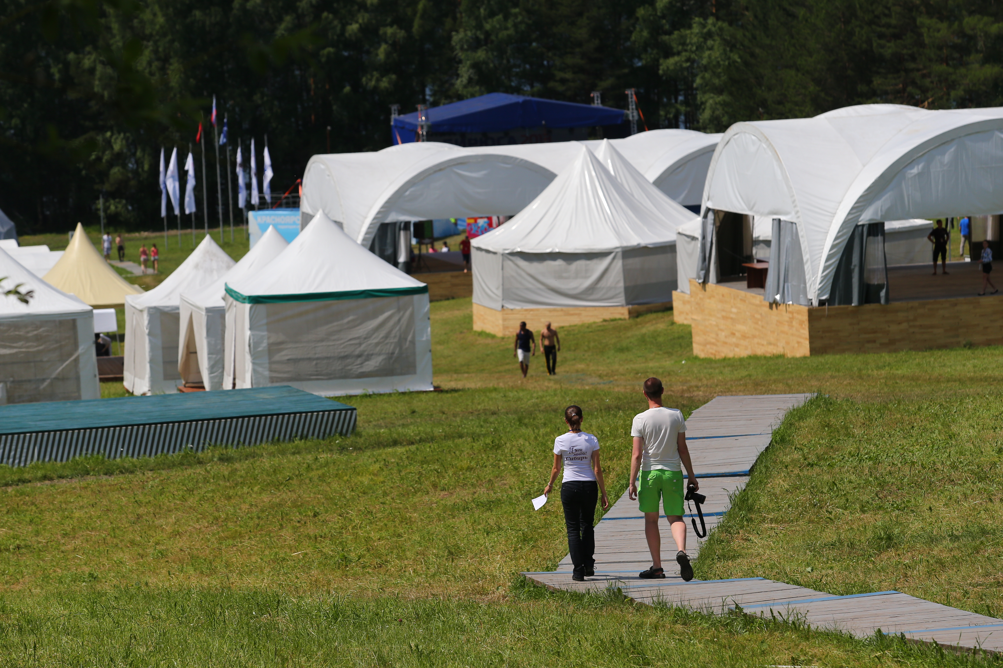 Вид на учебную зону